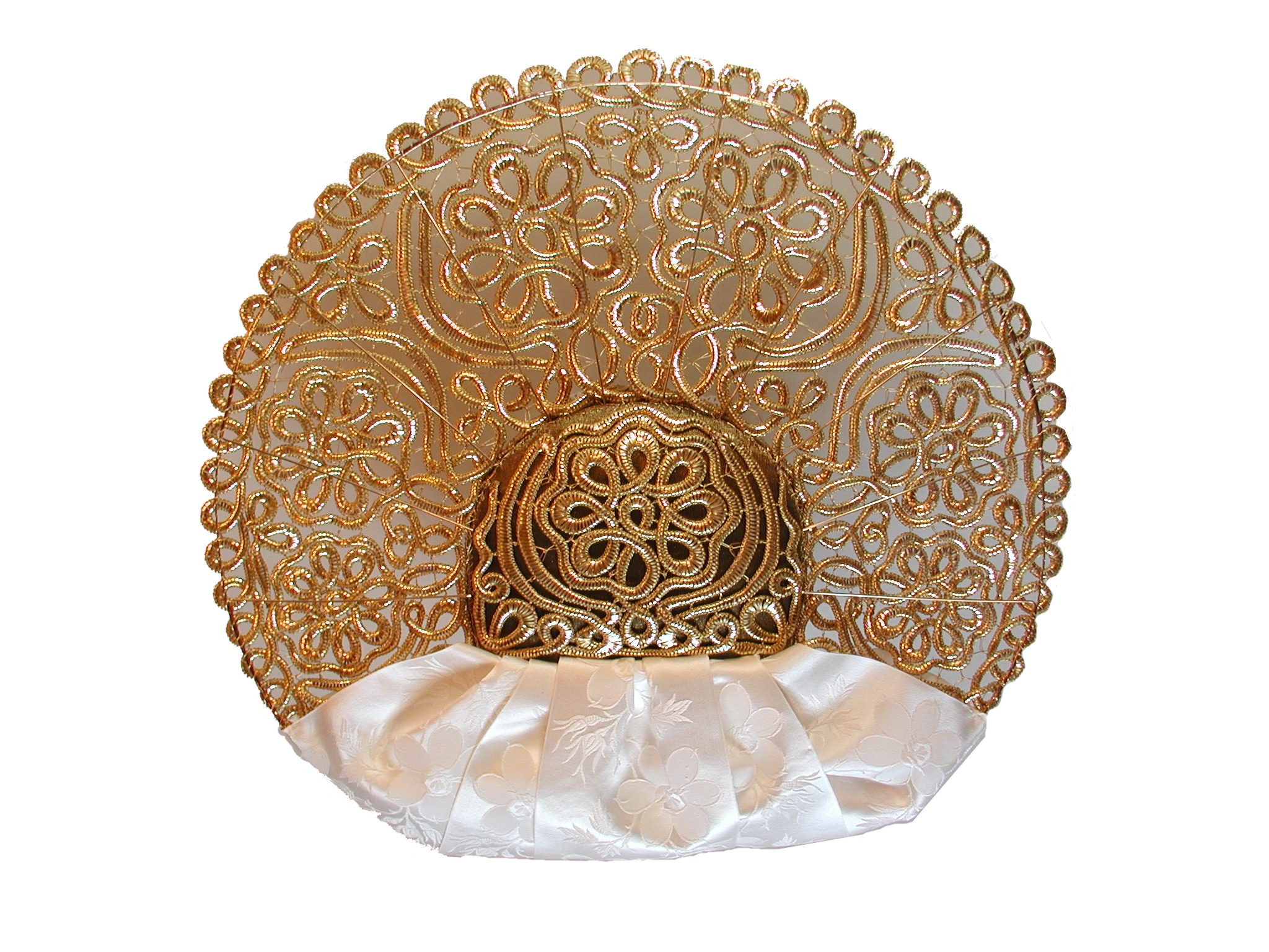 Goldene Radhaube in Laméspitze